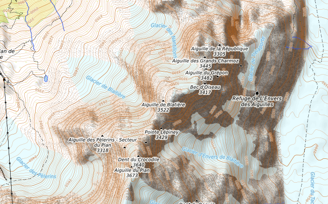 carte réalisée sur umap This map may be incomplete, and may contain errors. Don't rely solely on it for navigation.